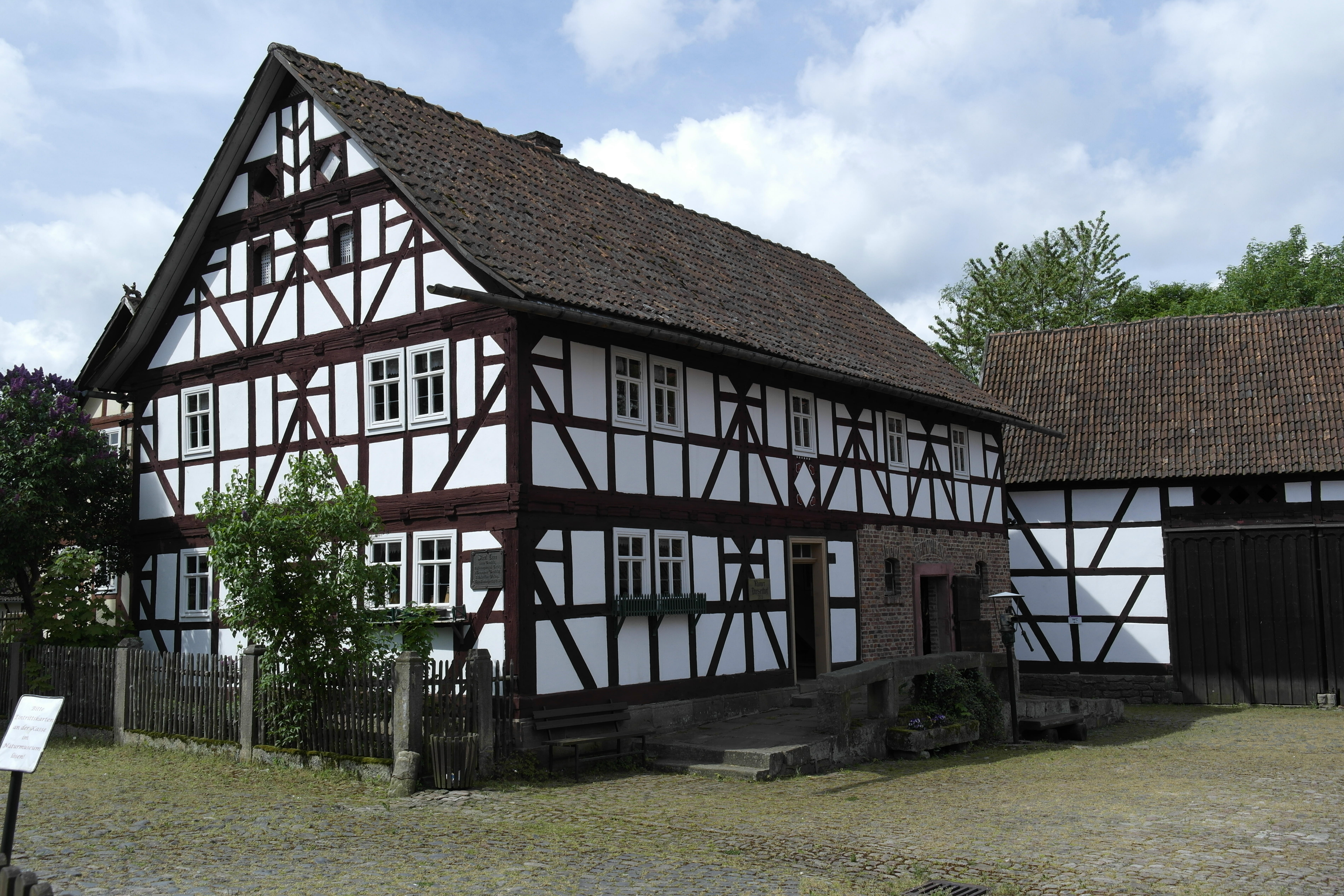 Denkmalobjekte in Tann (Rhön), Freiland-Museum